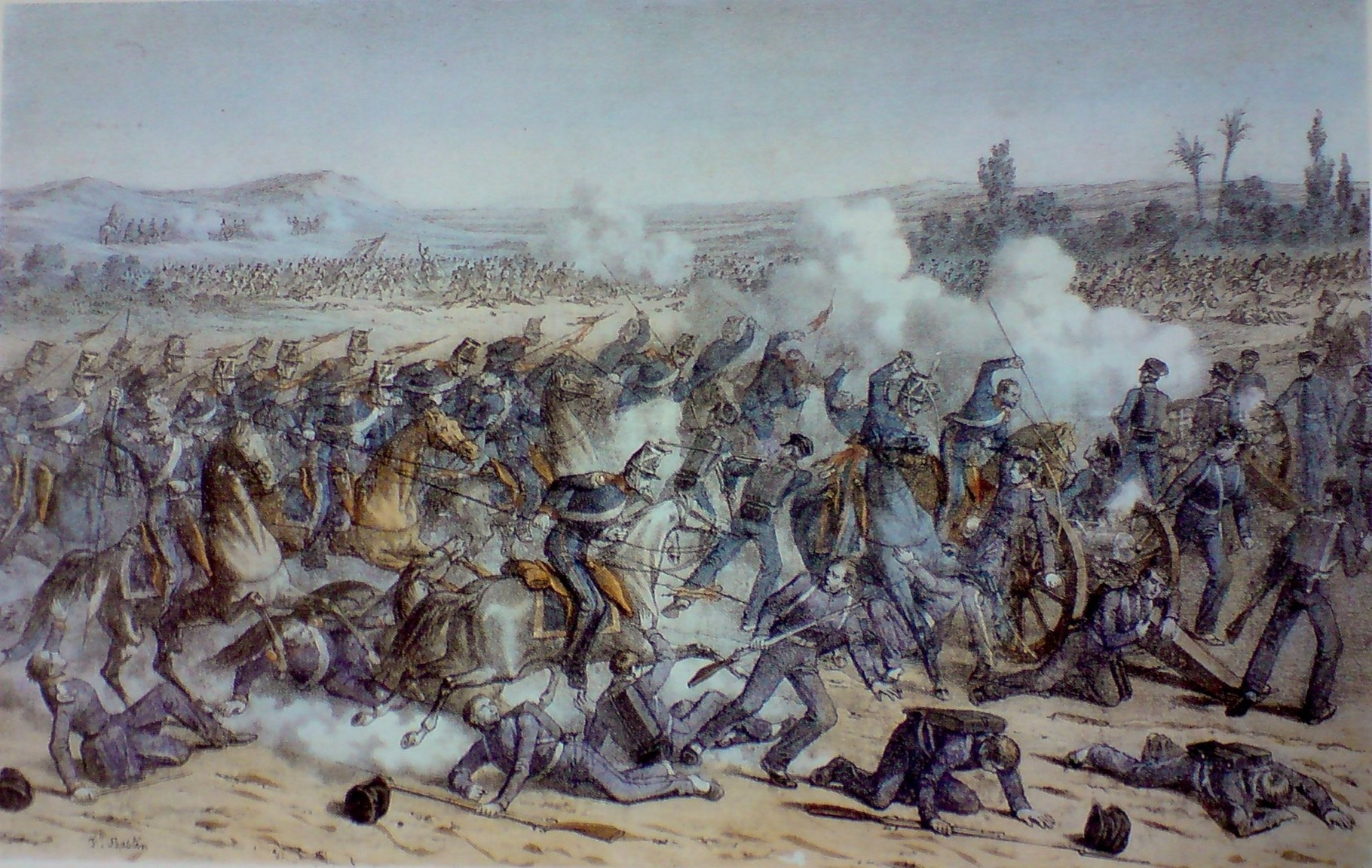 "Batalla de Sacramento-Terrible carga de los lanceros mexicanos contra el Ejercito estadounidense el 28 de febrero de 1847"